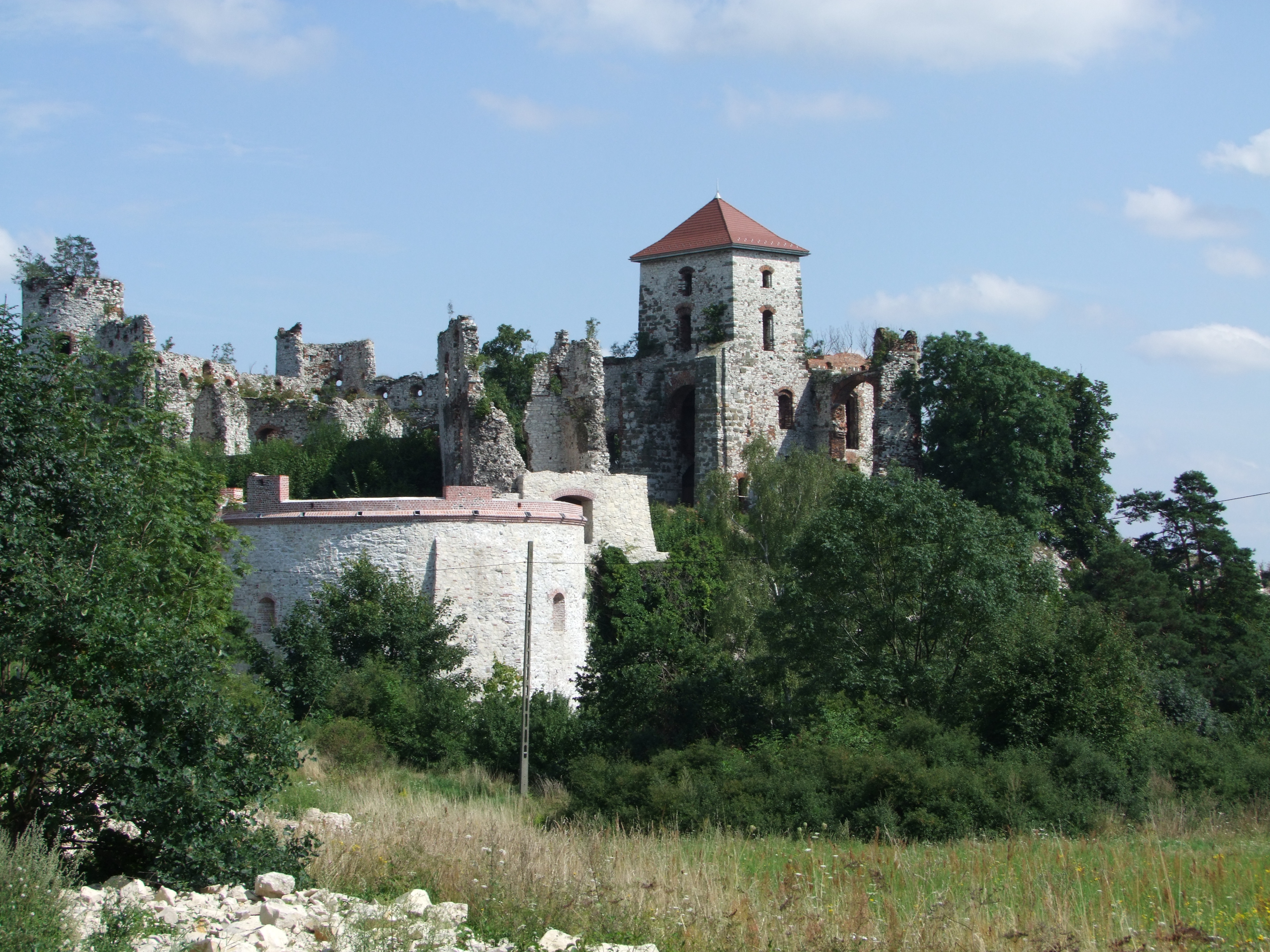 Stan ruin zamku Tenczyn po pracach renowacyjnych.